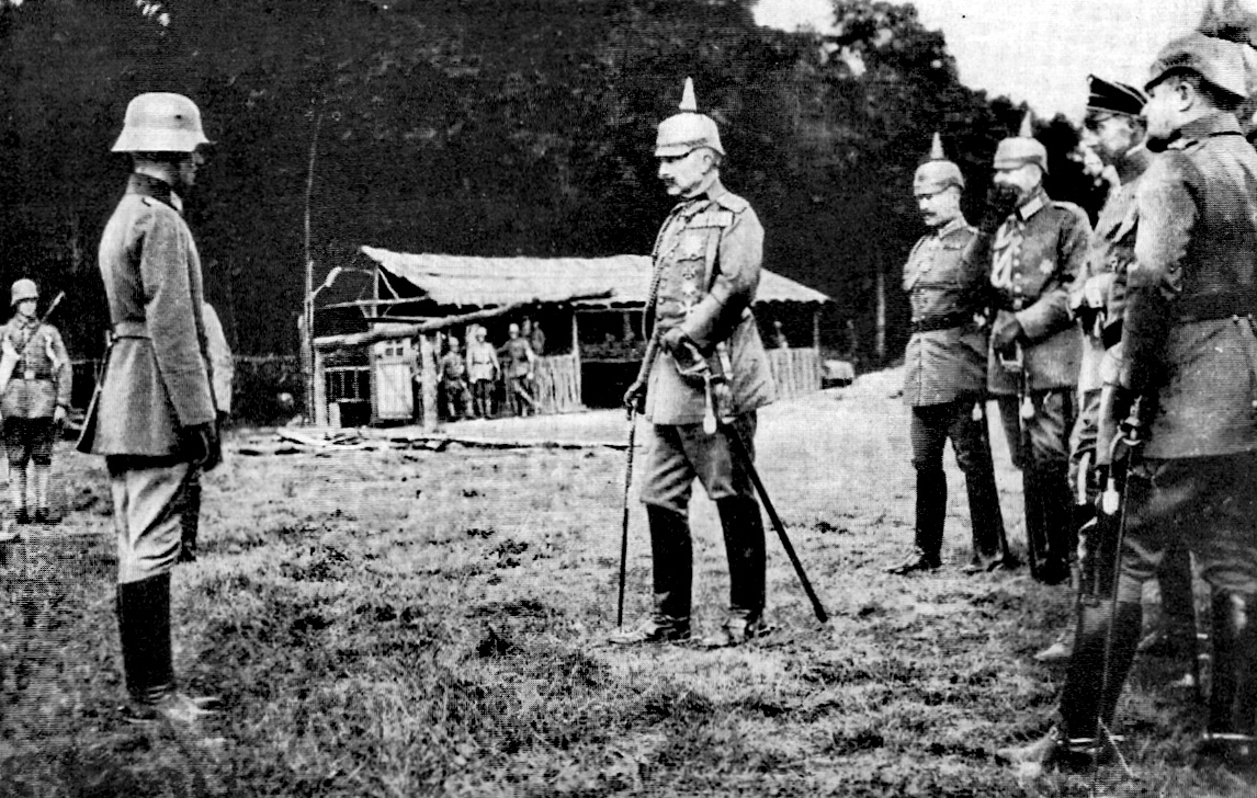 Der Kaiser bei der Besichtigung des Sturmbataillons Nr. 5 (Rohr) auf dem Übungsplatz bei Doncourt. Von links: Hauptmann Rohr; in der Gruppe rechts vom Kaiser: links Generaladjutant v. Chelius, rechts neben dem Kronprinzen Kriegsminister Wild v. Hohenborn, rechts dahinter (nur knapp zu sehen) Generalober v. Plessen